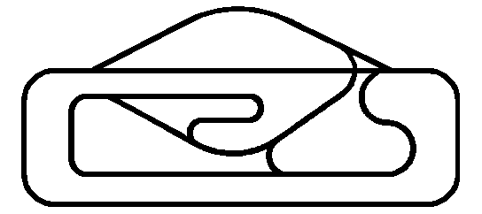 Traçado do circuito de Luanda